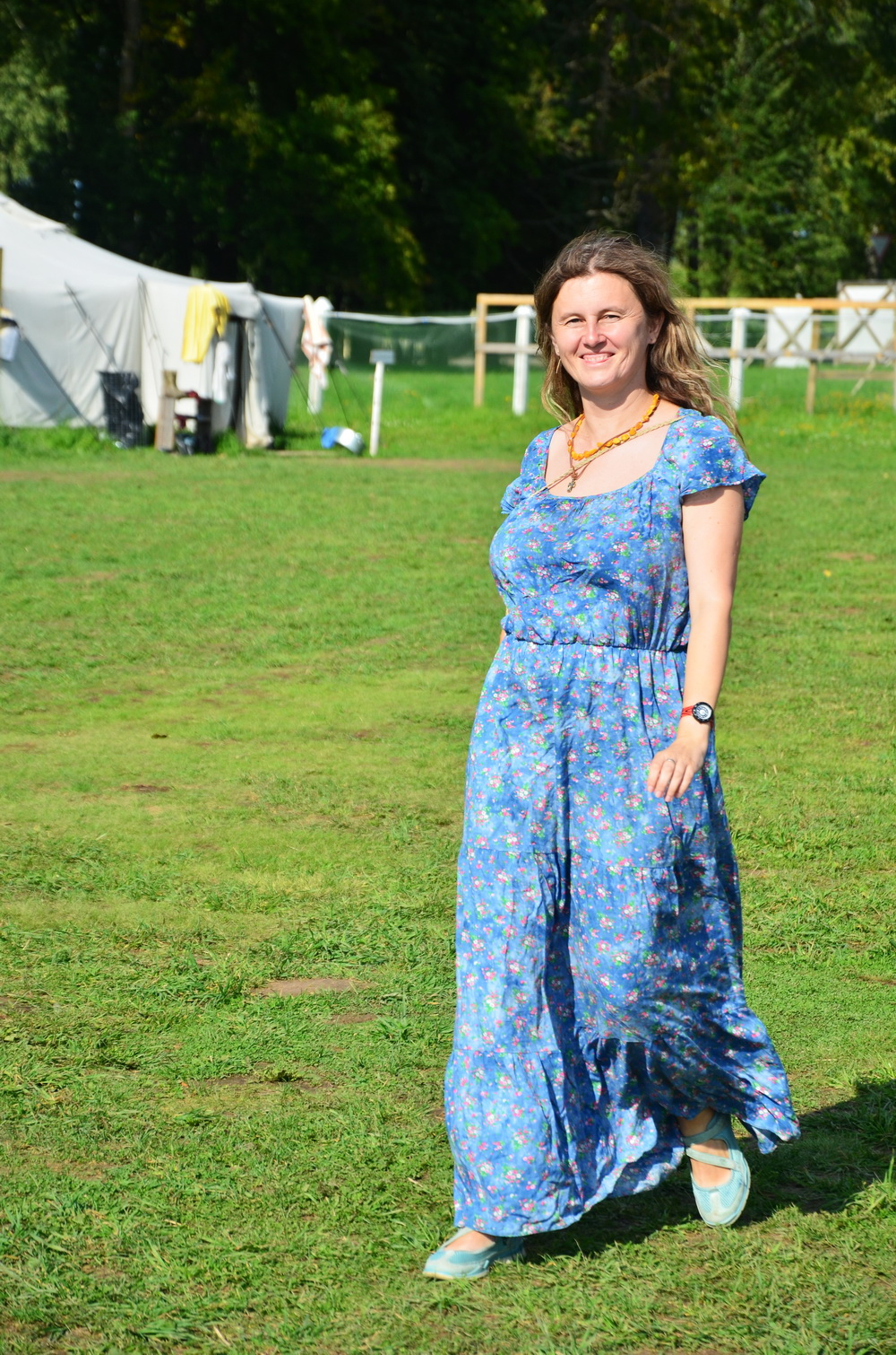 Оксана Шашуто, основатели и глава фестиваля "Братья"